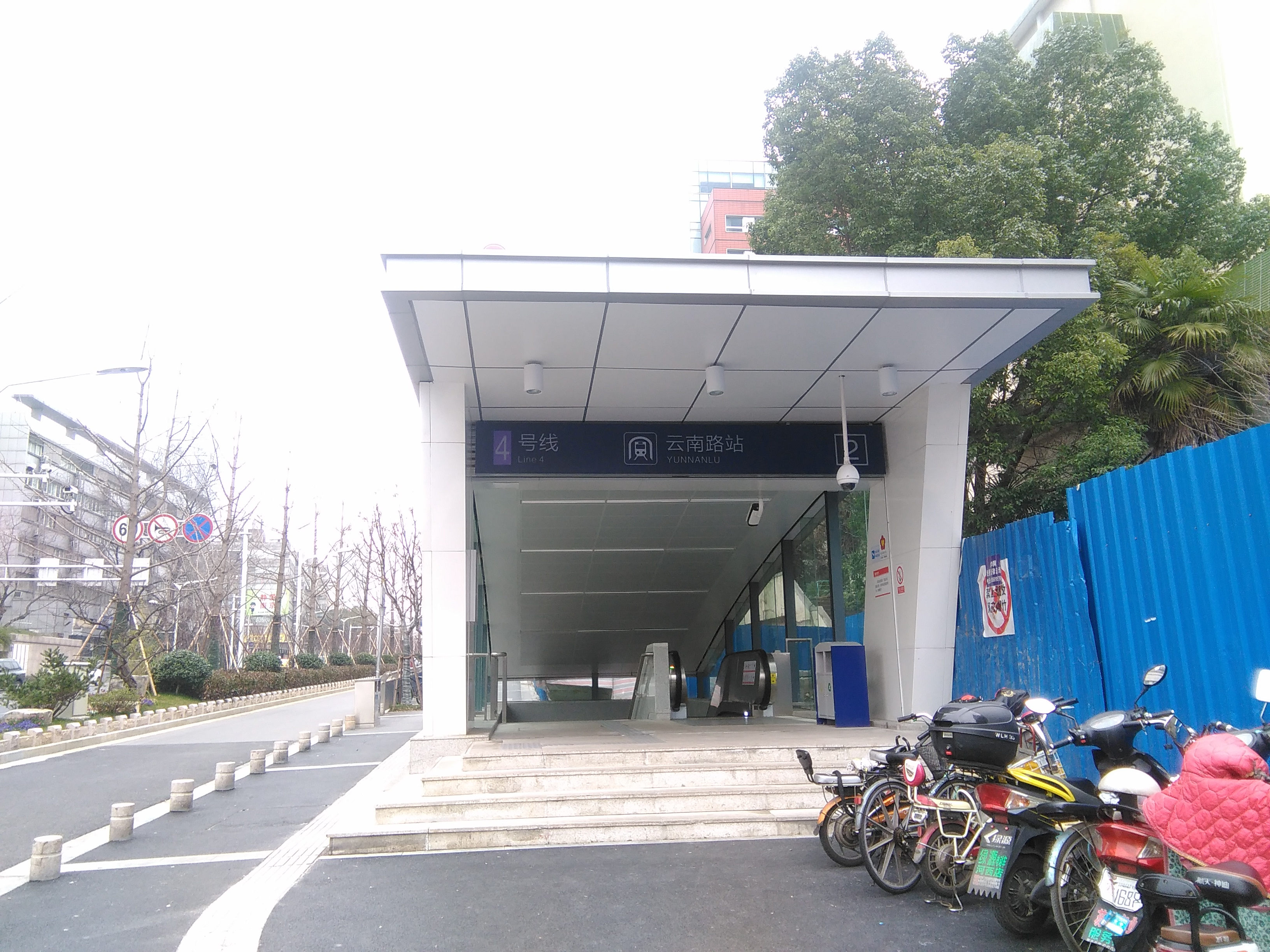 云南路站（2号口）。